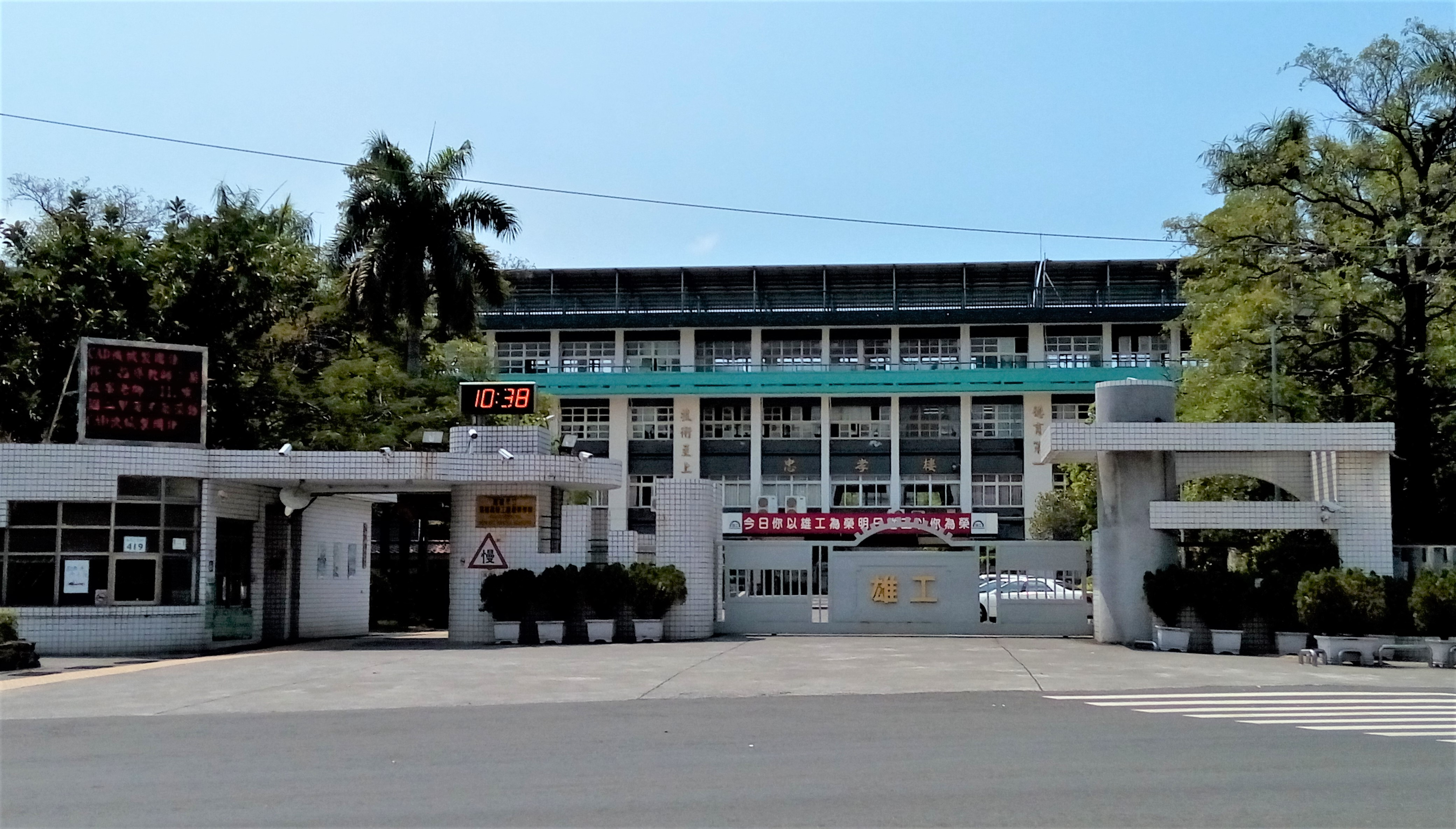 高雄高工校門